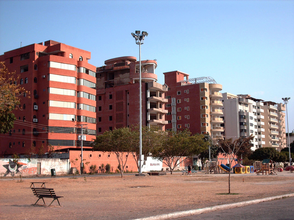 Edificios de Urb. La Soledad. Mun. Girardot. Maracay, estado Aragua